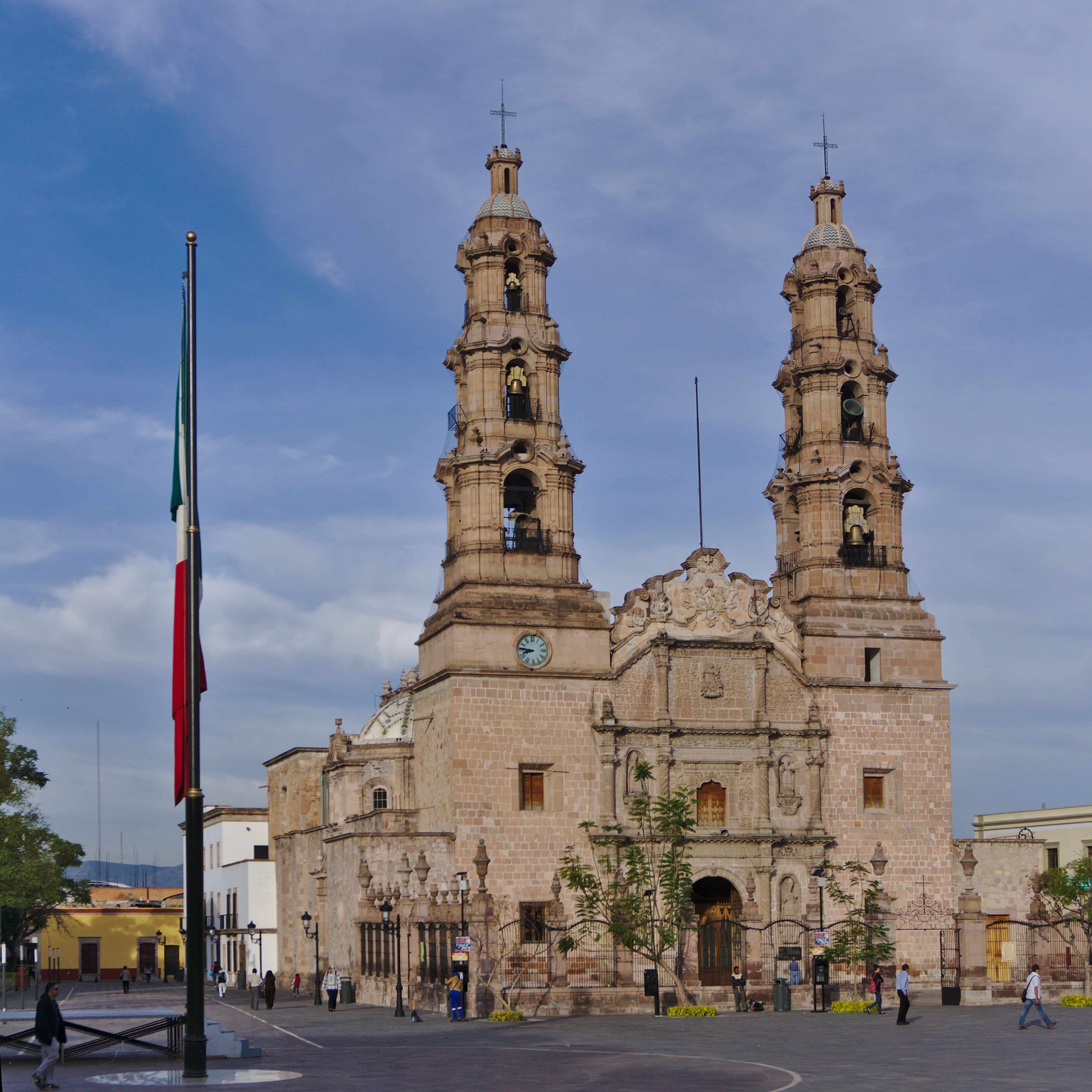 Catedral de la Ciudad de Aguascalientes, México